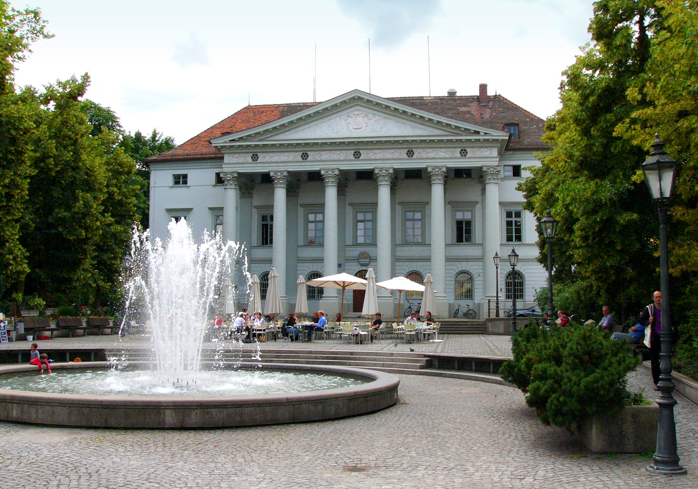 Bismarckplatz, Regensburg, Germany